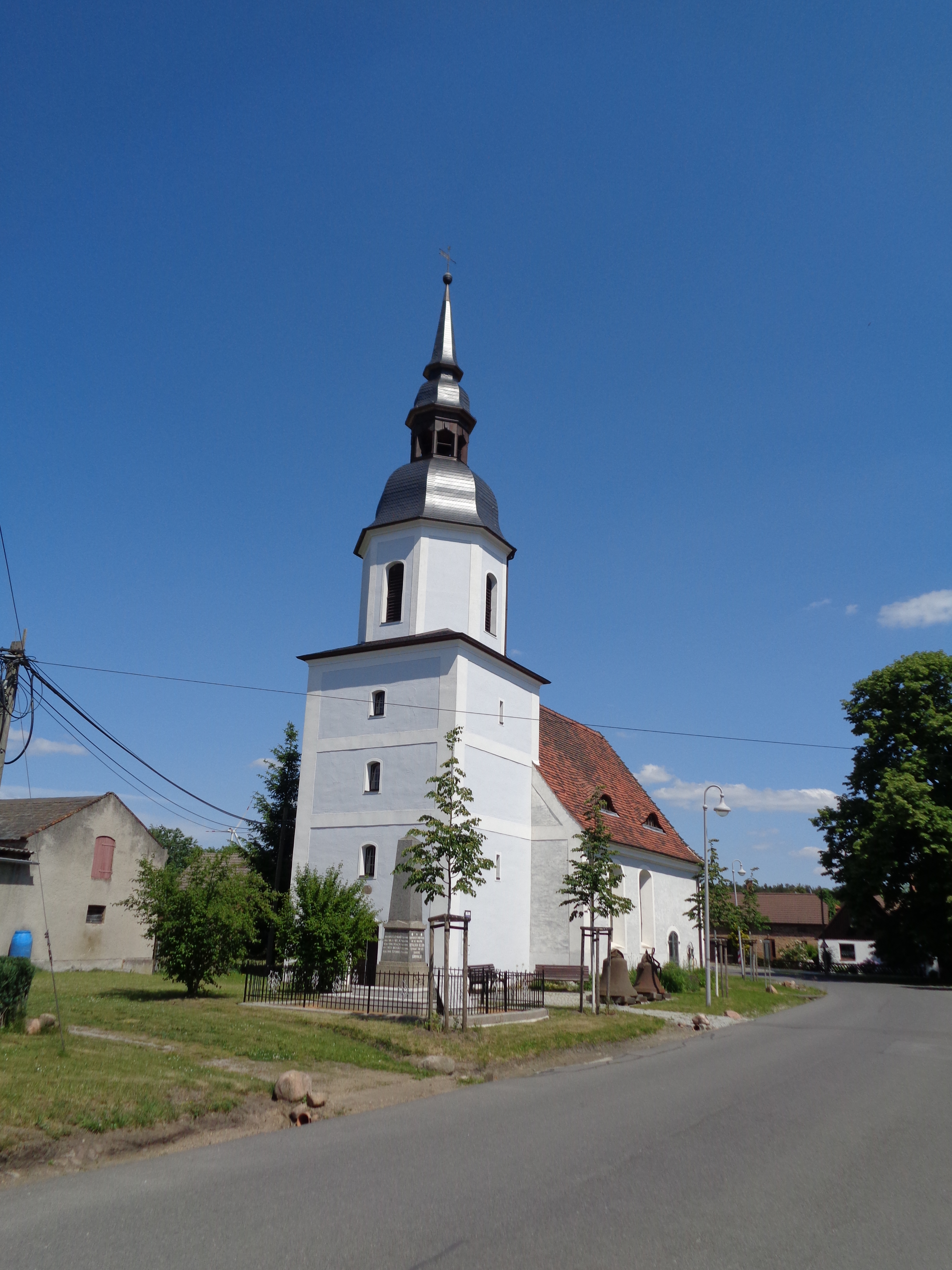 denkmalgeschützte Kirche Dörrwalde mit neugebautem Turm